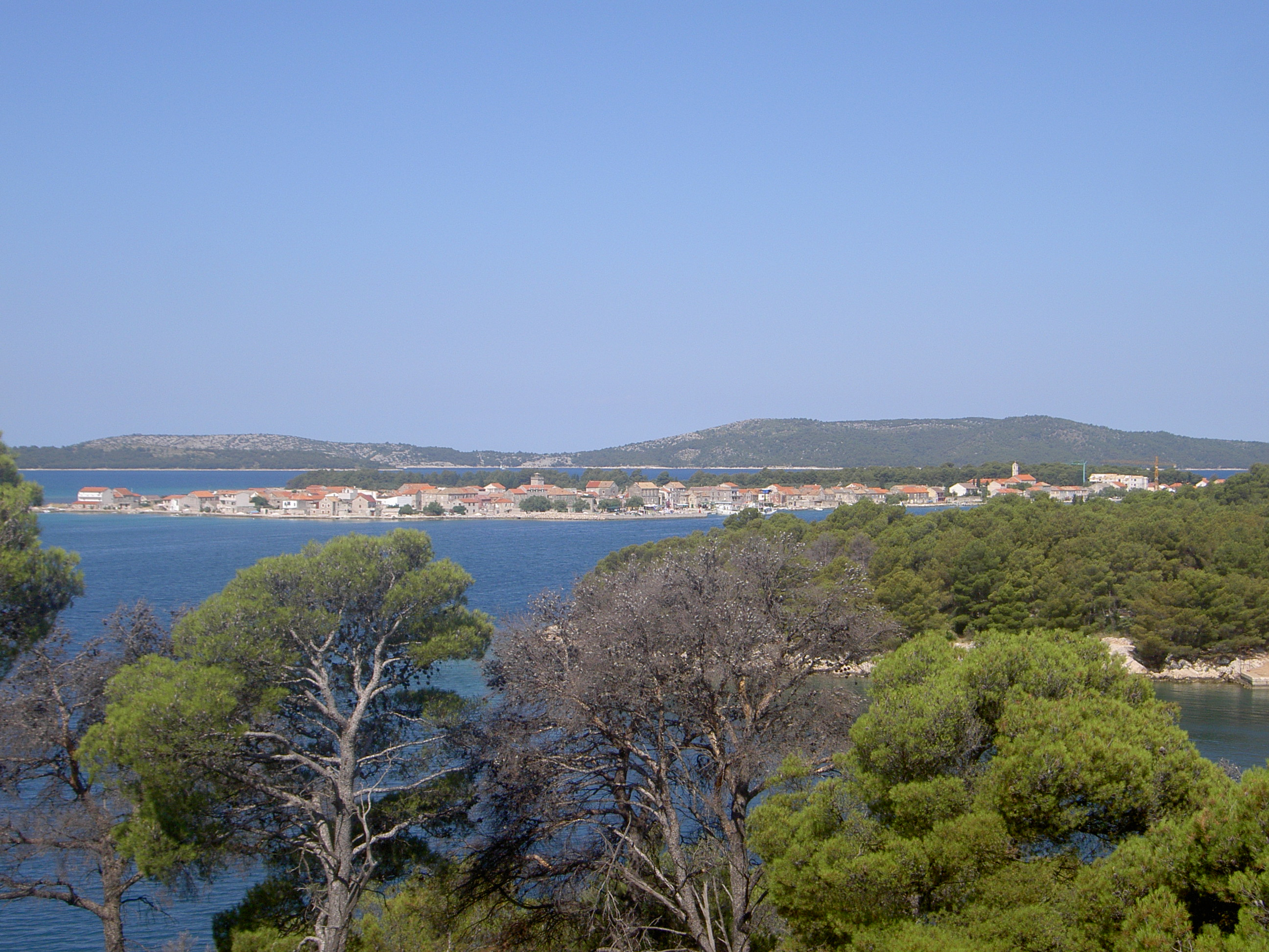 Krapanj, picture taken by Tomislav Vukelja